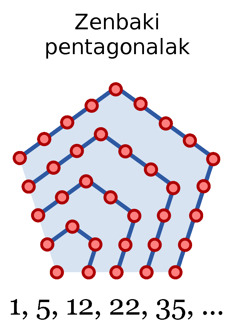 Zenbaki pentagonalak